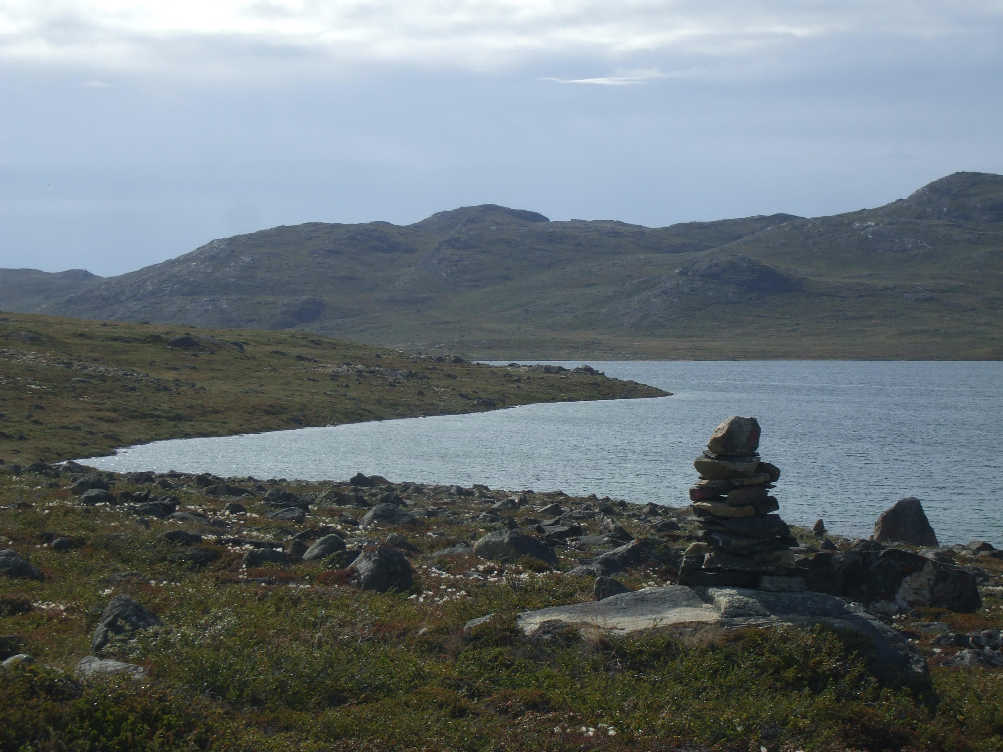 Kangerlussuaq à Sissimiut 2 inukshuk (cairn) Groenland 2009 Expédition ACarré